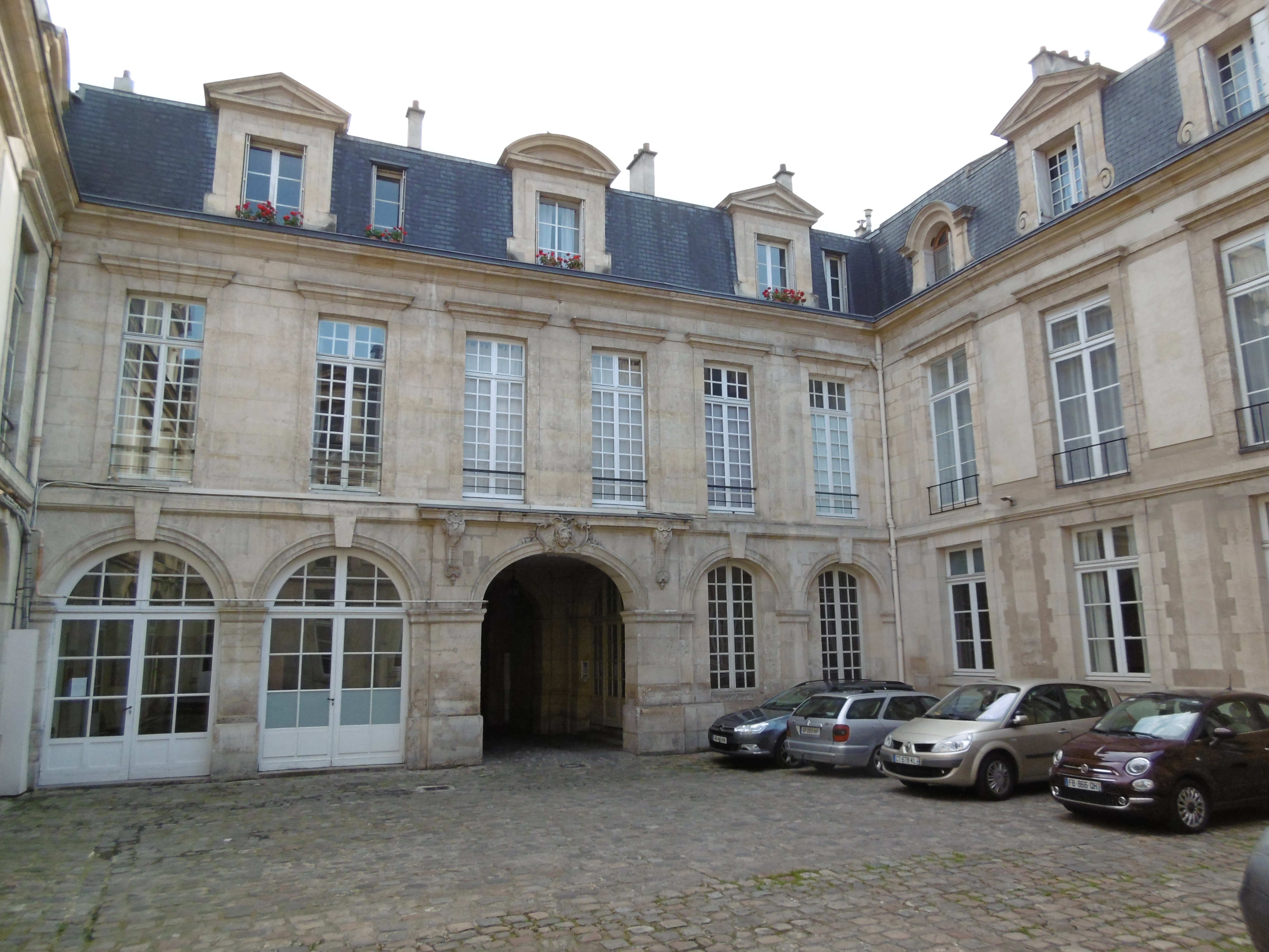 Hôtel Le Rebours Cour (2)